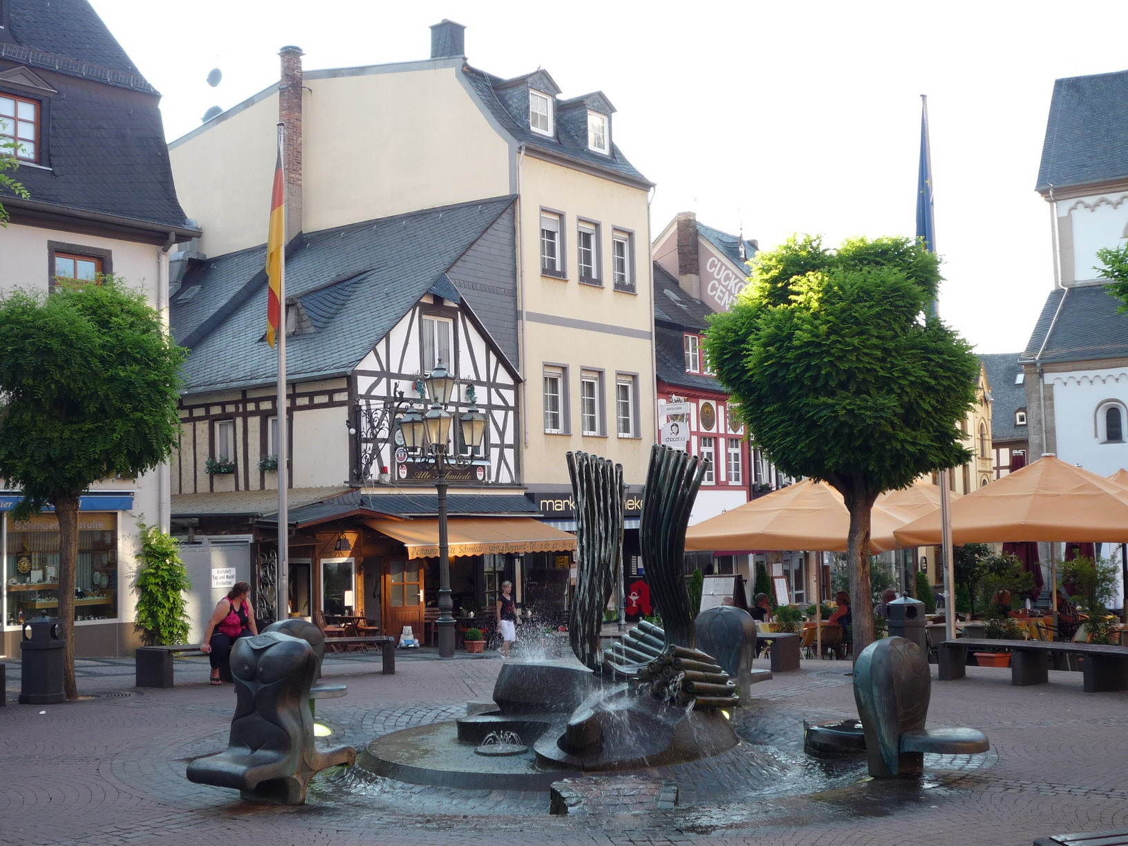 Thonet-Brunnen auf dem Marktplatz in Boppard